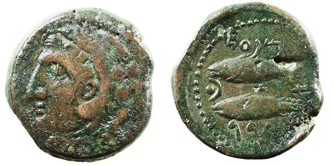 As púnico de bronce acuñado en Gadir, la actual Cádiz (España). En el anverso muestra una cabeza masculina a izquierda, que representa a Melkart (llamado Hércules por los romanos); en el reverso, dos atunes a izquierda con varias letras fenicias. (fuente)